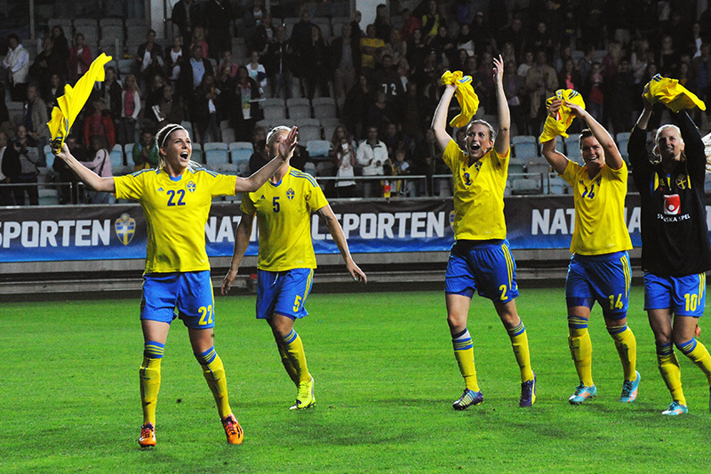 a_100_2034